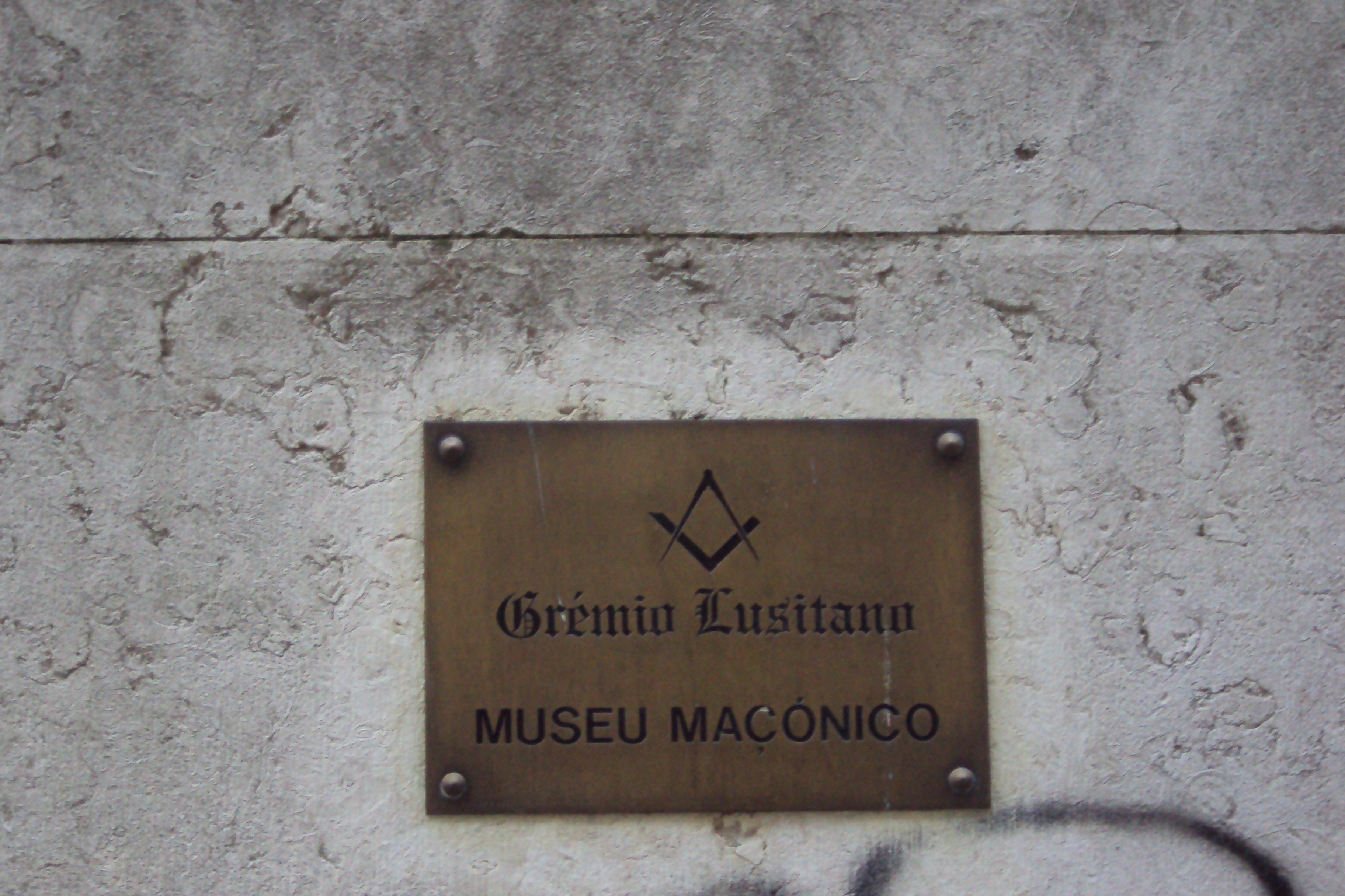 Placa na entrada principal da Loja Grande Oriente Lusitano, Rua do Grémio Lusitano, 25, Lisboa-Portugal Site